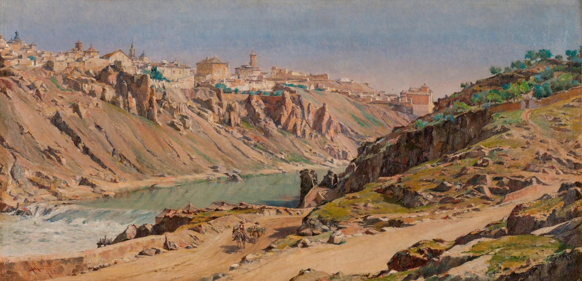 Vista de la ciudad española de Toledo. En primer plano, el río Tajo, la carretera de Navalpino y bajada a los Molinos de Solanilla, bajo los Cigarrales del Cerro de la Cabeza, con dos personajes montando en burro. Al fondo, en lo alto y a la izquierda, amplia y detallada topografía de la parte occidental de Toledo, desde la roca Tarpeya hasta San Gil.